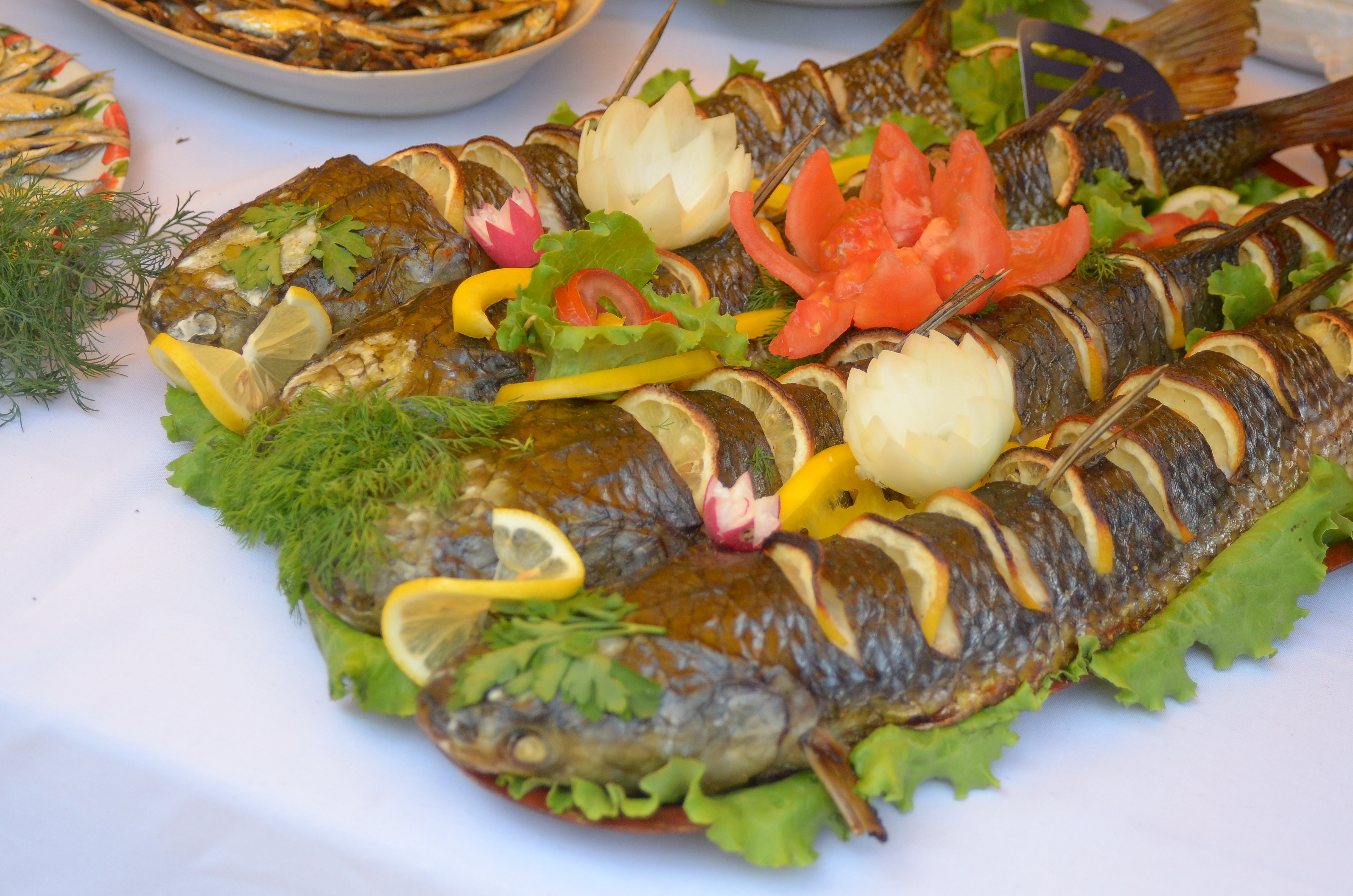 Фестиваль славянской культуры в Донецке.